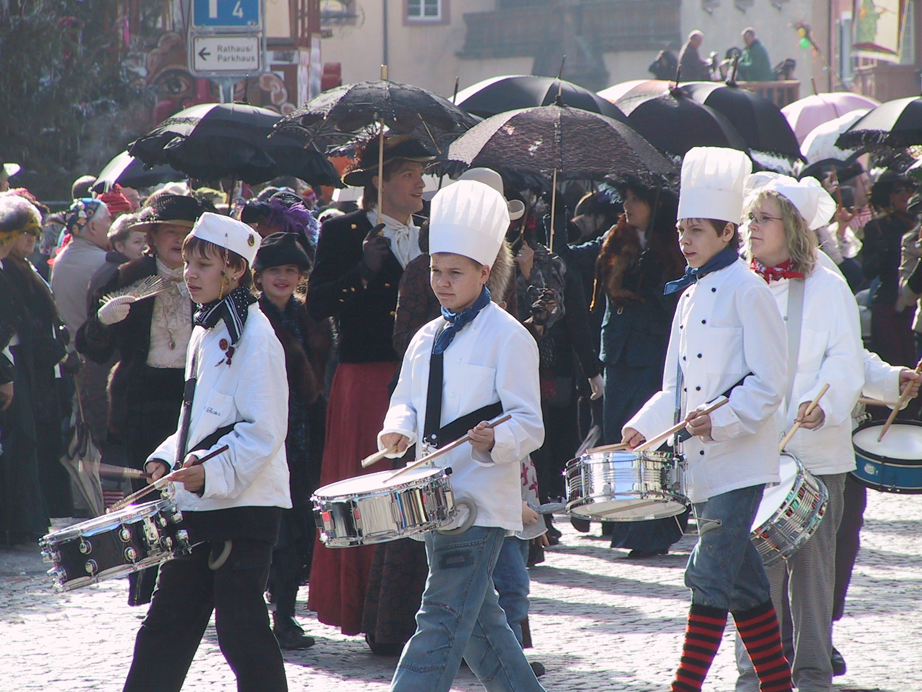 Kaffetanten und Trommler bei der Fasnet in Wolfach im Schwarzwald, Fasnetsdienstag 2007.